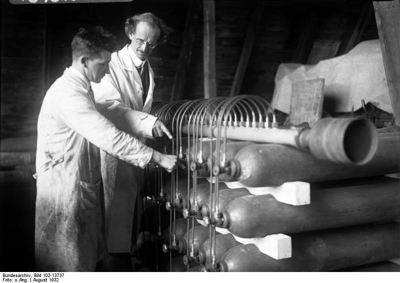 Der bekannte Höhenforscher Professor Piccard, bereitet sich in der Schweiz auf seinen neuen Stratosphärenflug vor ! Vorbereitungen zu dem neuen Höhenflug Prof. Piccards ! Prof. Piccard überwacht selbst die Gaszusammenstellung für seinen neuen Flug.